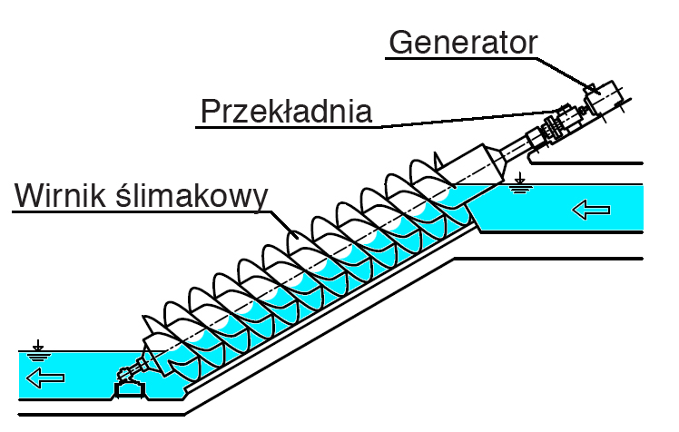 Mała elektrownia wodna z turbiną Archimedesa (ślimakową)